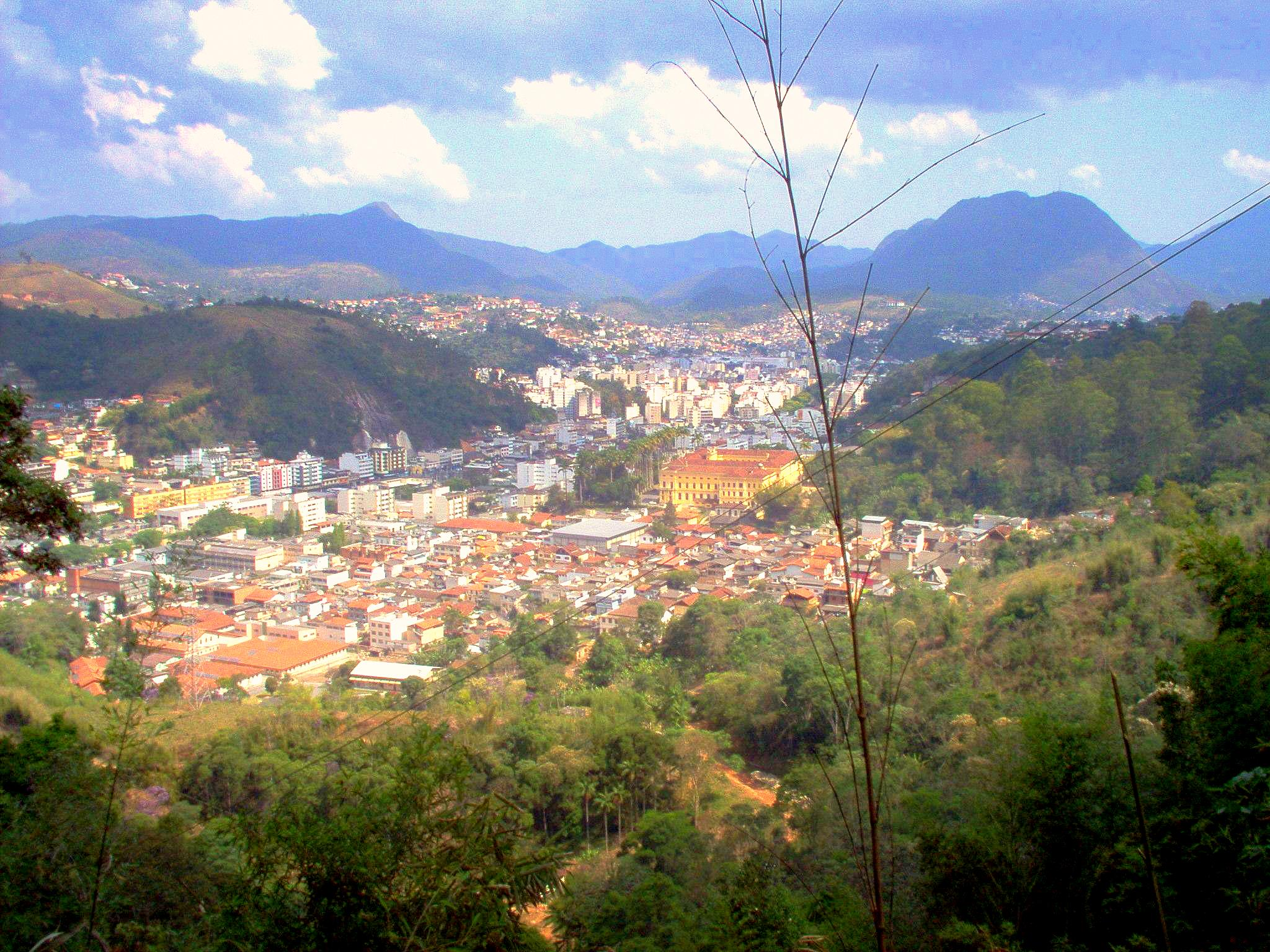 Imagem de Nova Friburgo